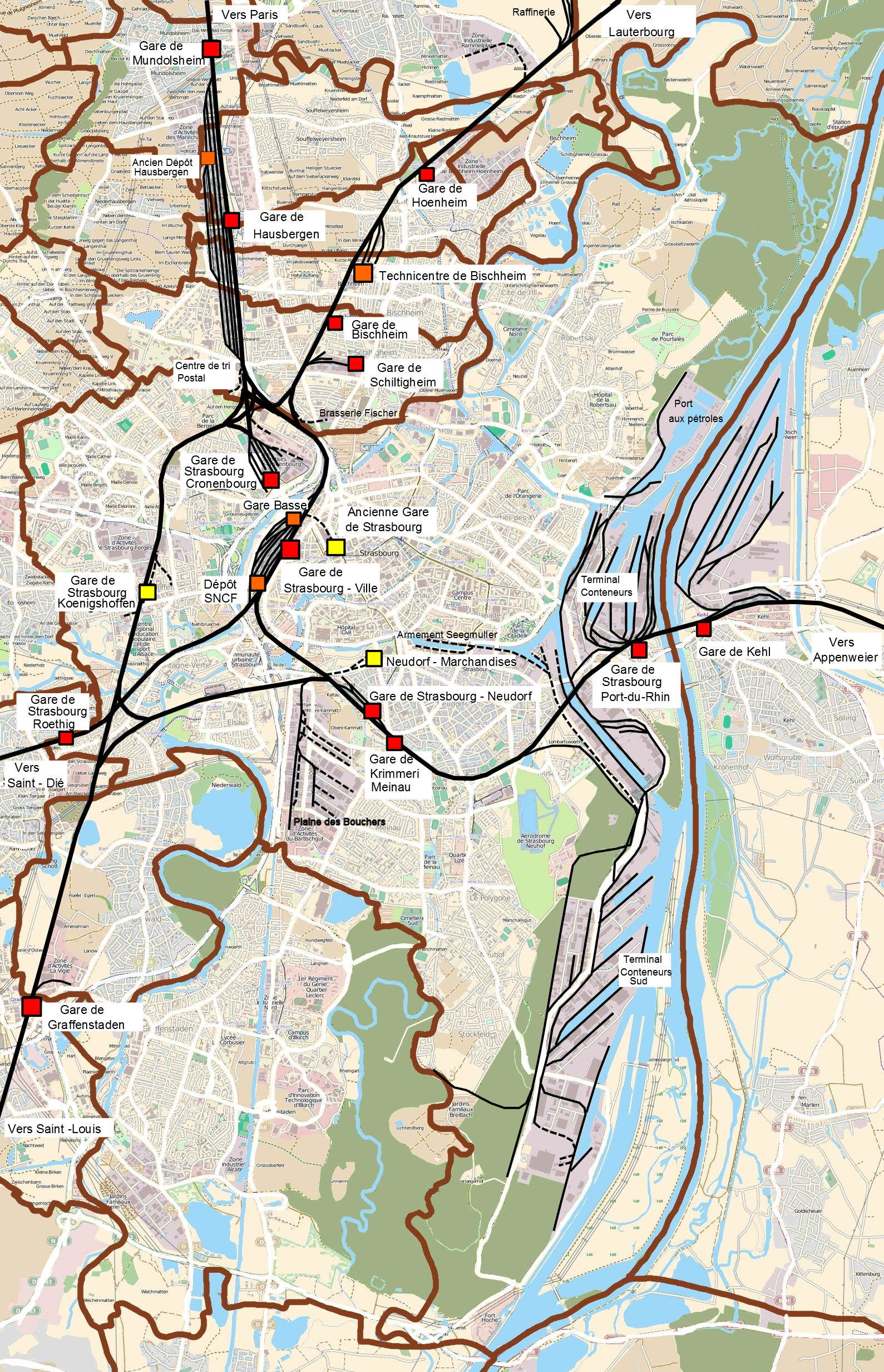 Plan du nœud ferroviaire de Strasbourg, Bas-Rhin, France. Traits épais: lignes principales. Traits fins: voies de services, embranchements. Pointillés: voies déposées. En rouge: gares ouvertes. En jaune: gares fermées. En orange: autres.